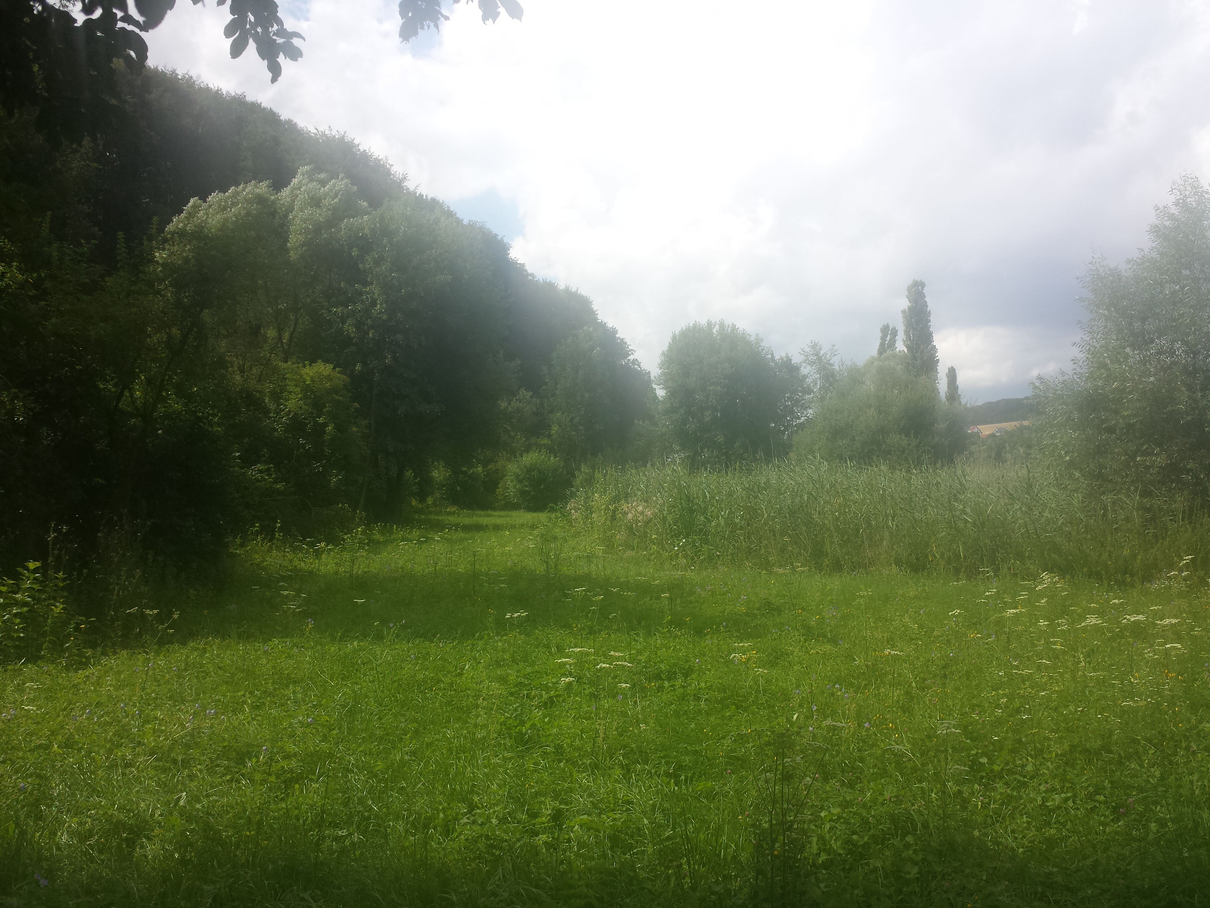 Ein Teilbereich des EU-Vogelschutzgebietes "Heiden und Wälder Tauberland" in einem Tal vor Dienstadt.